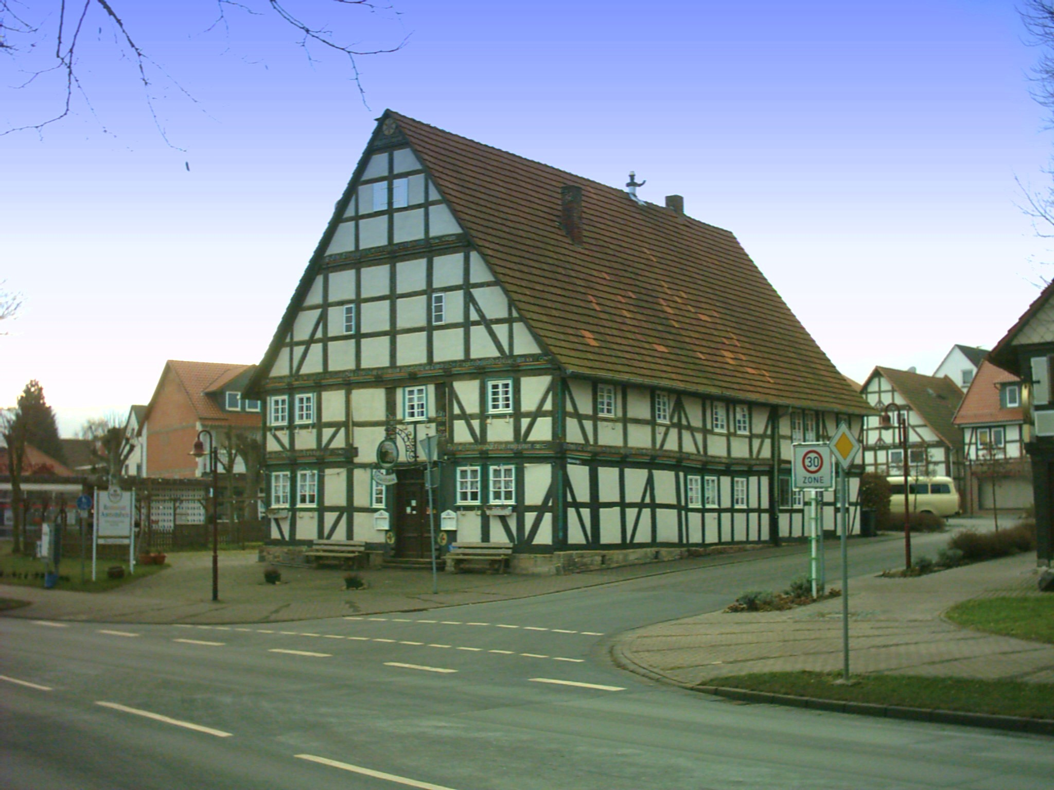 Amtsstube: Fachwerkgebäude in Reinhardshagen-Veckerhagen - selbst fotografiert Jan. 2006 - GNU-FDL